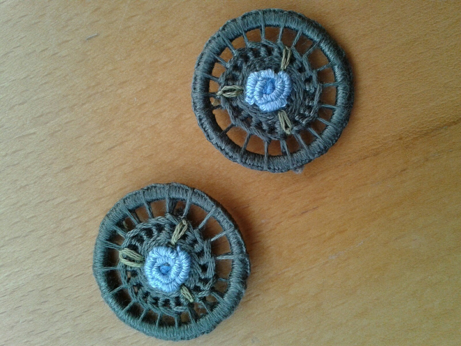 Dorset buttons